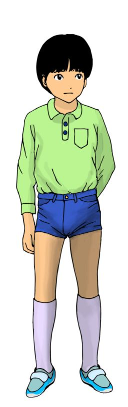 半ズボンを着用した男の子